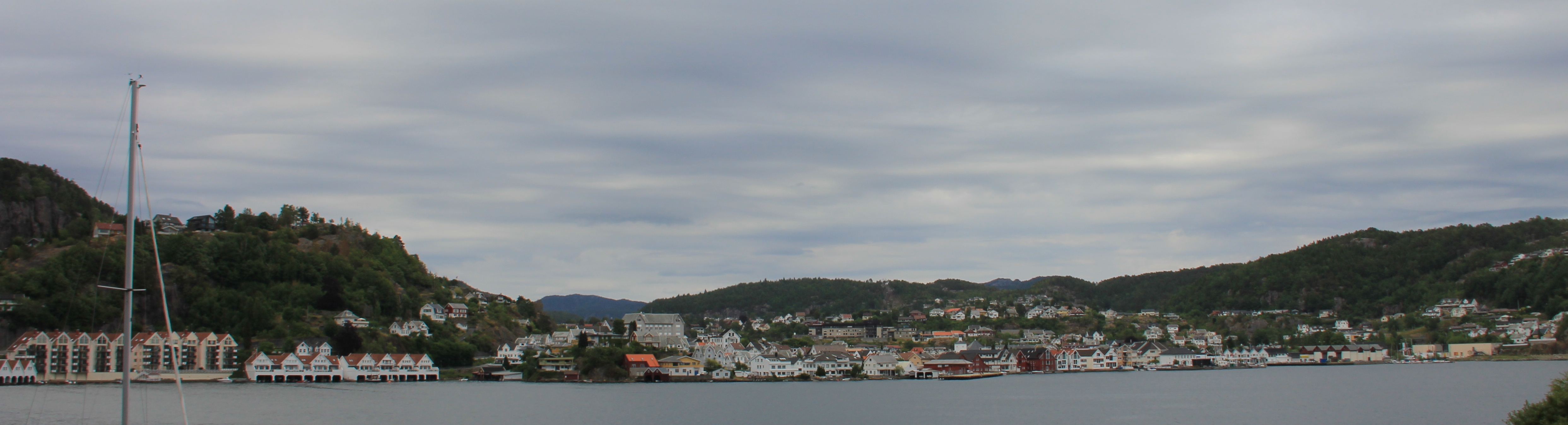 Flekkefjord, panoramic view